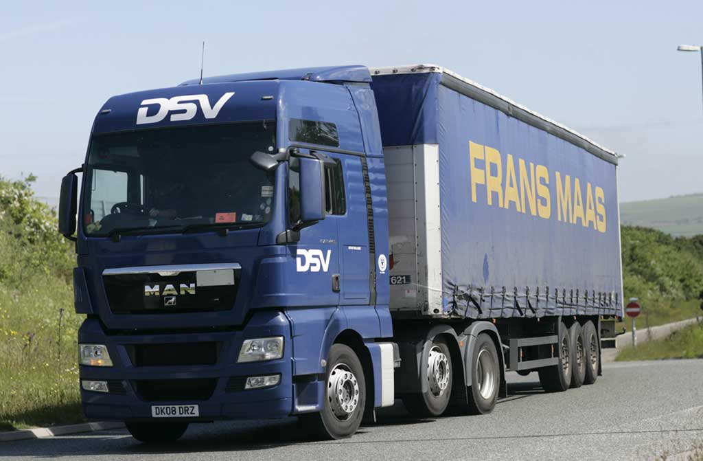 DSV